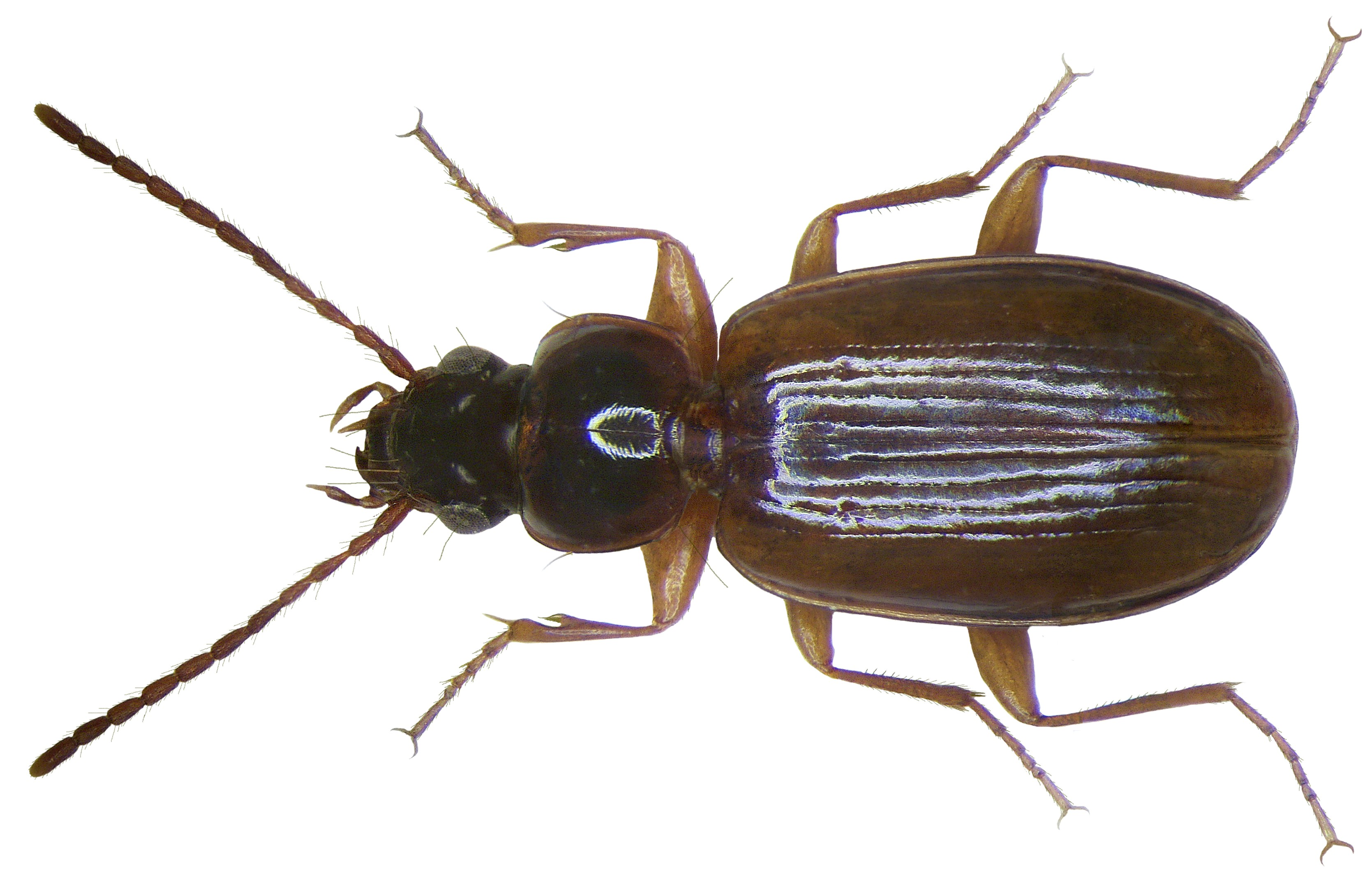 Familie: Carabidae Größe: 3,5-4,5 mm Verbreitung: Europa und Westasien Ökologie: bevorzugt offenes und sonniges Gelände Fundort: Germania, Oberfranken, Kulmbach leg.det. U.Schmidt, 1976 Foto: U.Schmidt, 2008